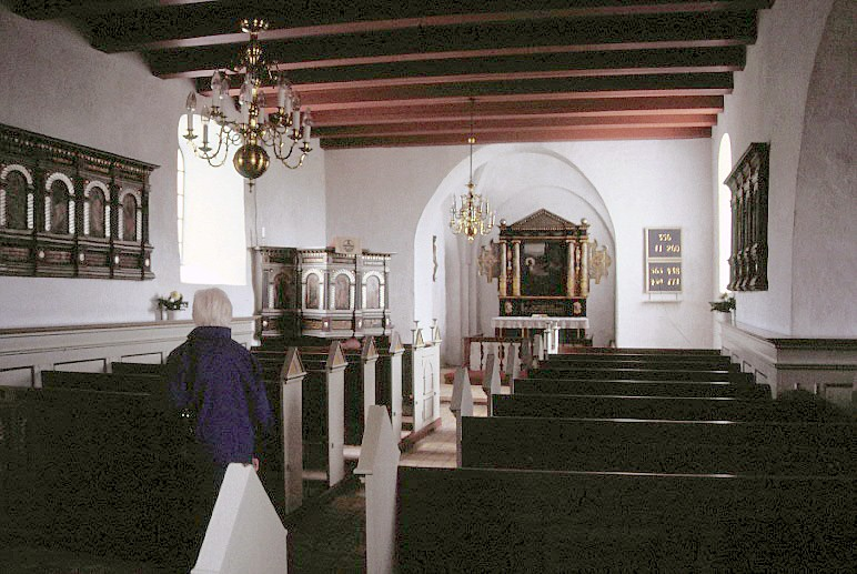 Horsens Kirke i Danmark. Skibet set mod øst